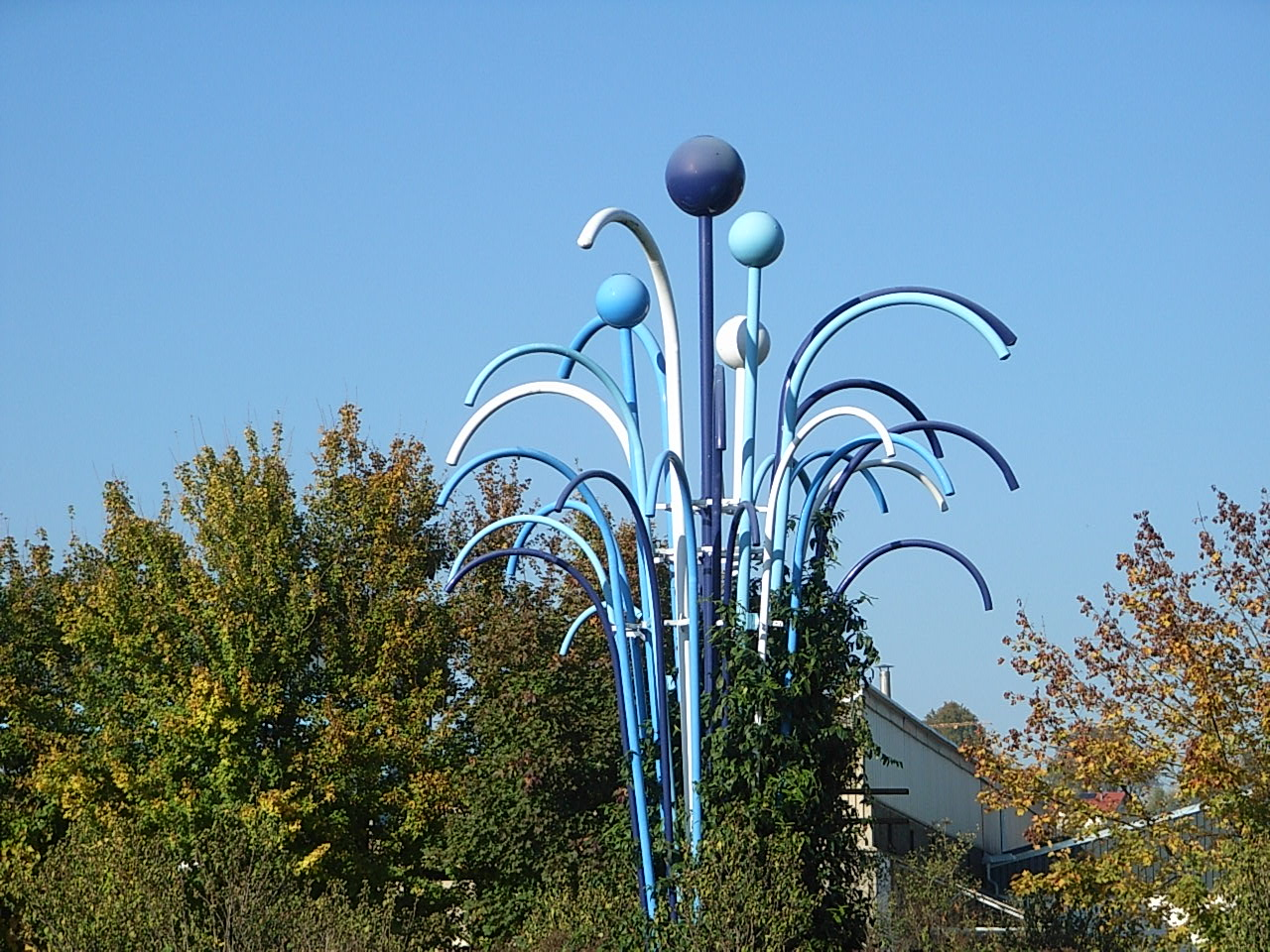 Symbolische Darstellung der Thermalquelle von Bad Birnbach